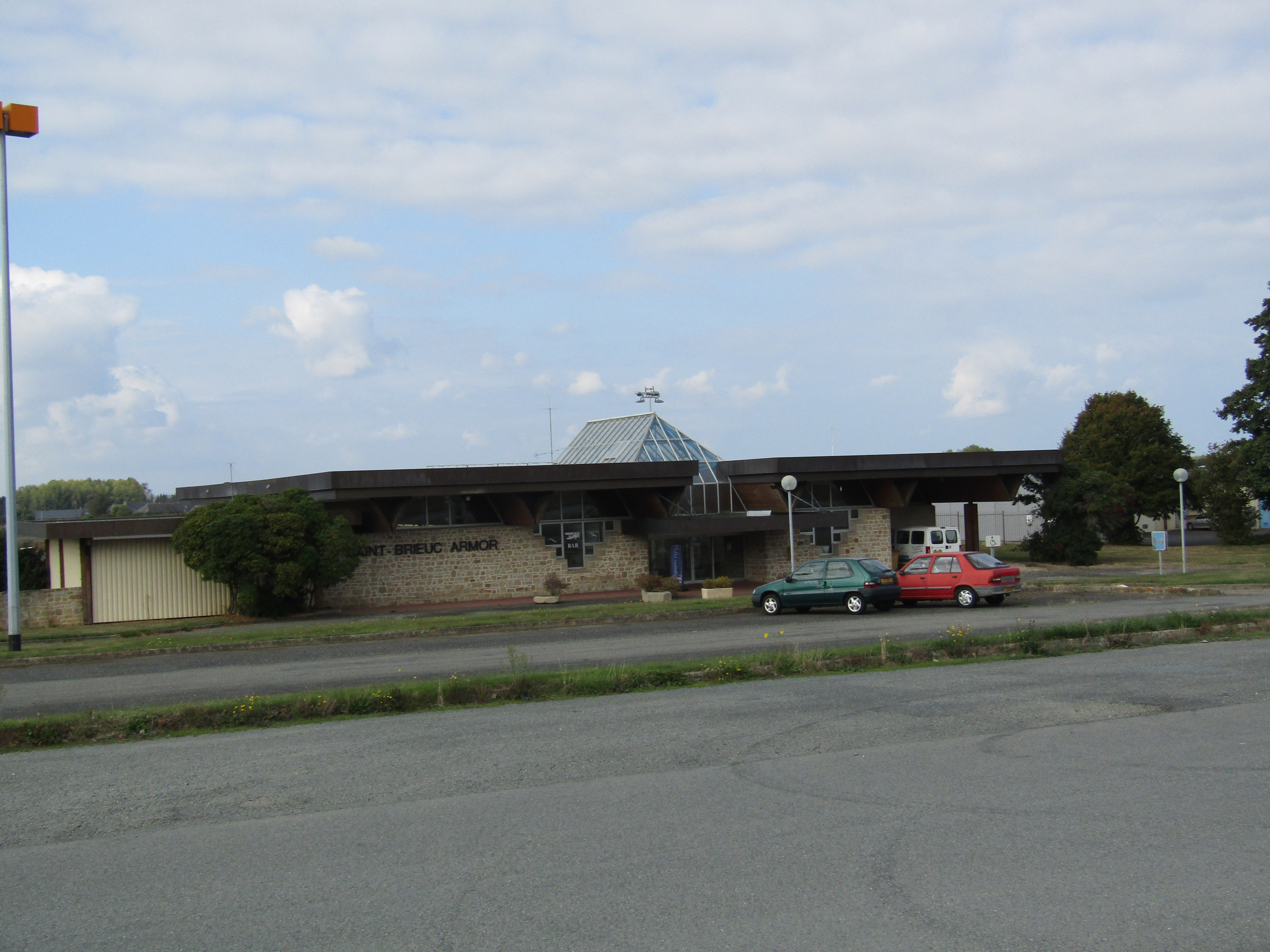 Vue de l'aérogare depuis le parking